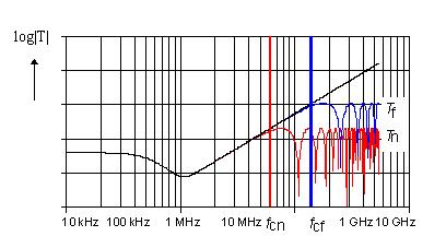 Kopplungsübertragungsfunktion